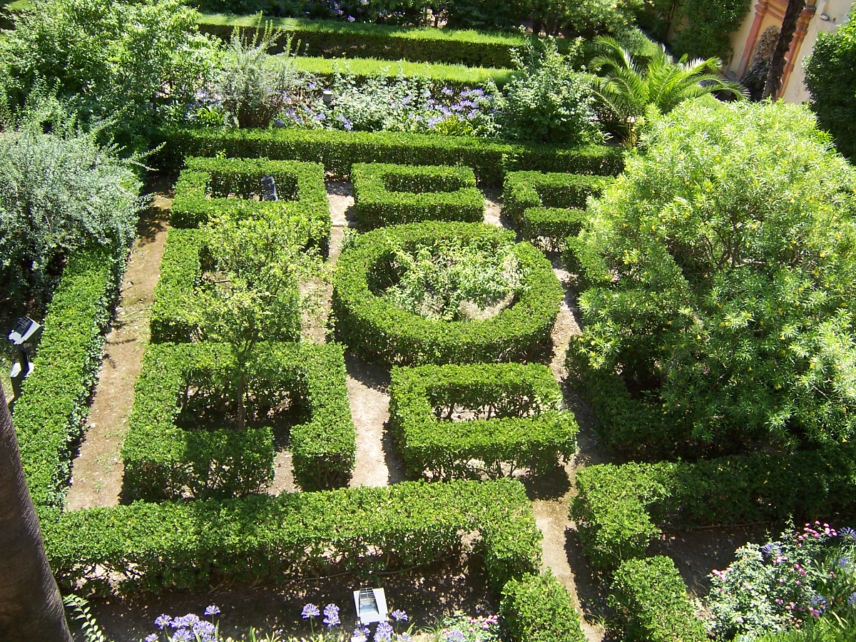 Jardines del Alcázar de Sevilla camera: Kodak DX7440 Source: *Daniel Csorfoly